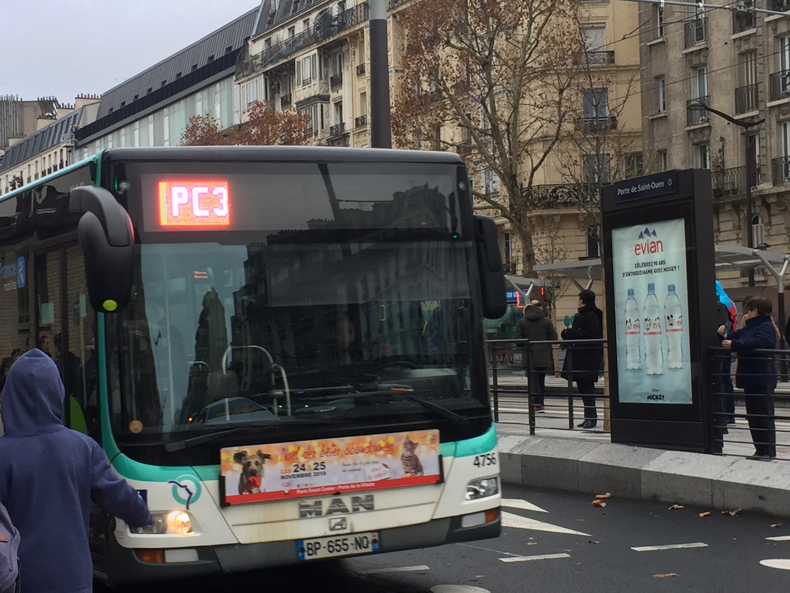 Un bus PC 3 le 24 novembre 2018, dernier jour de sa circulation au niveau de la station de tramway "Porte de Saint-Ouen"